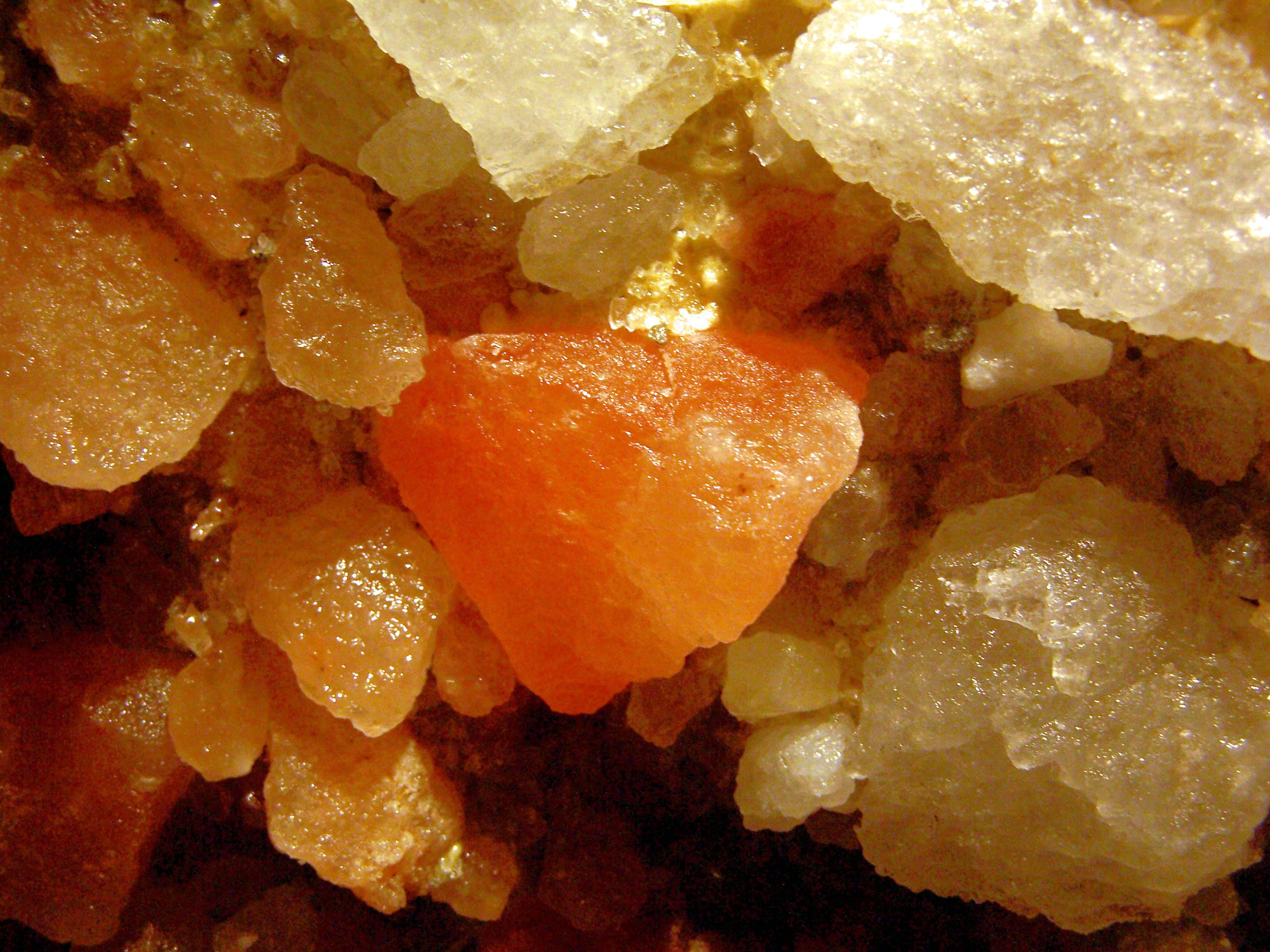 Kryształy soli kamiennej w podziemiach Sandomierza.